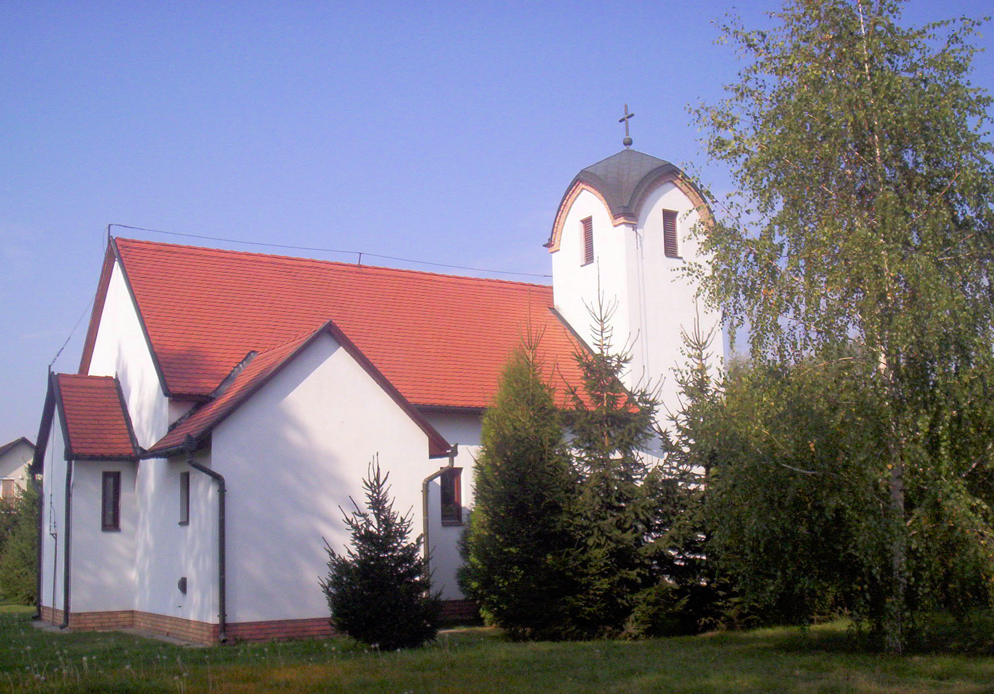 A nagymányoki evangélikus templom. Tervező: Krähling János. Felszentelve: 1994. április 16. – photo taken by uploader User:Csanády in 2006.